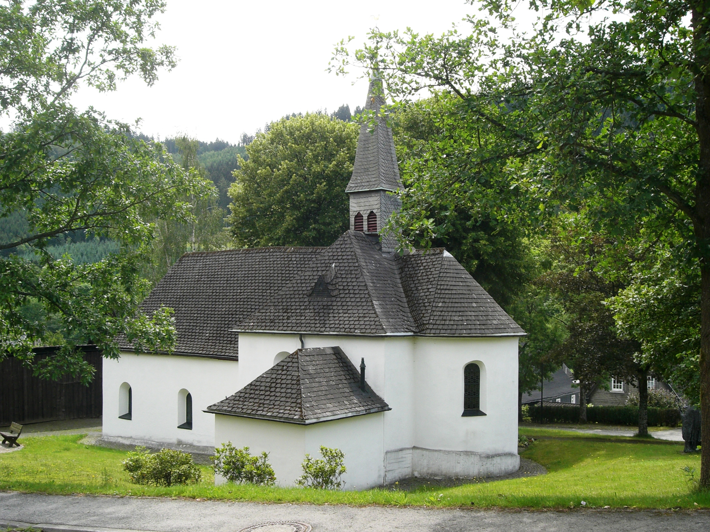 denkmalgeschützte Kapelle St. Hubertus